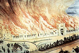 Brand des Garden Palace in Sydney, 1882